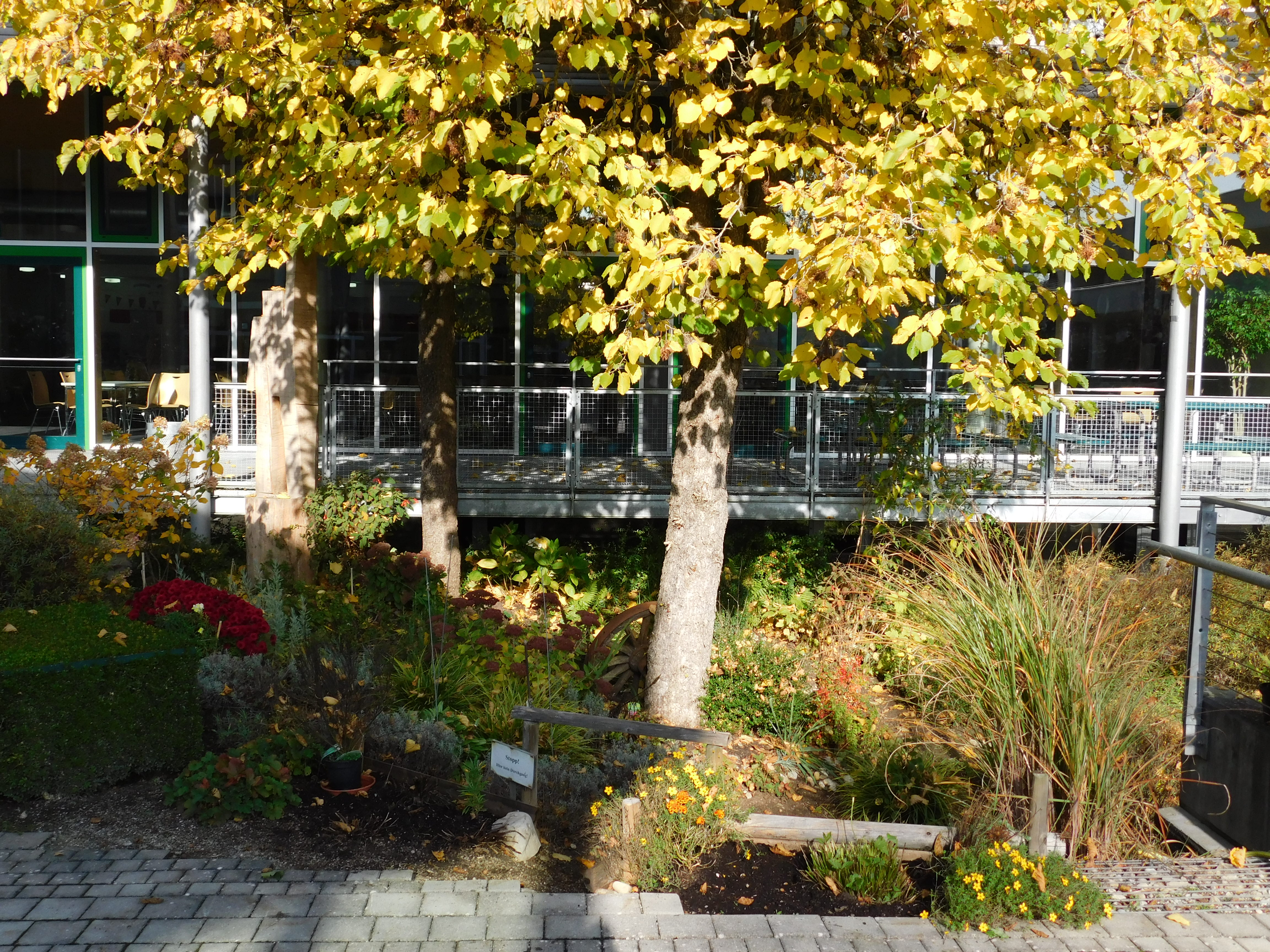 Christoph-Probst-Gymnasium Gilching Bayern Deutschland Schulgarten